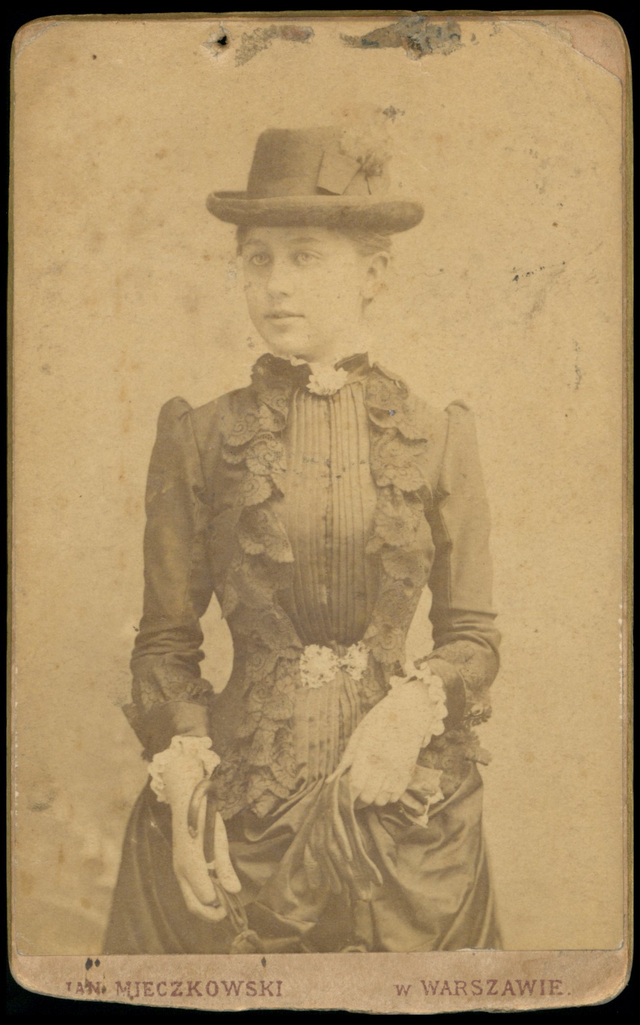 Portret Jadwigi Szczawińskiej - Dawidowej 1878